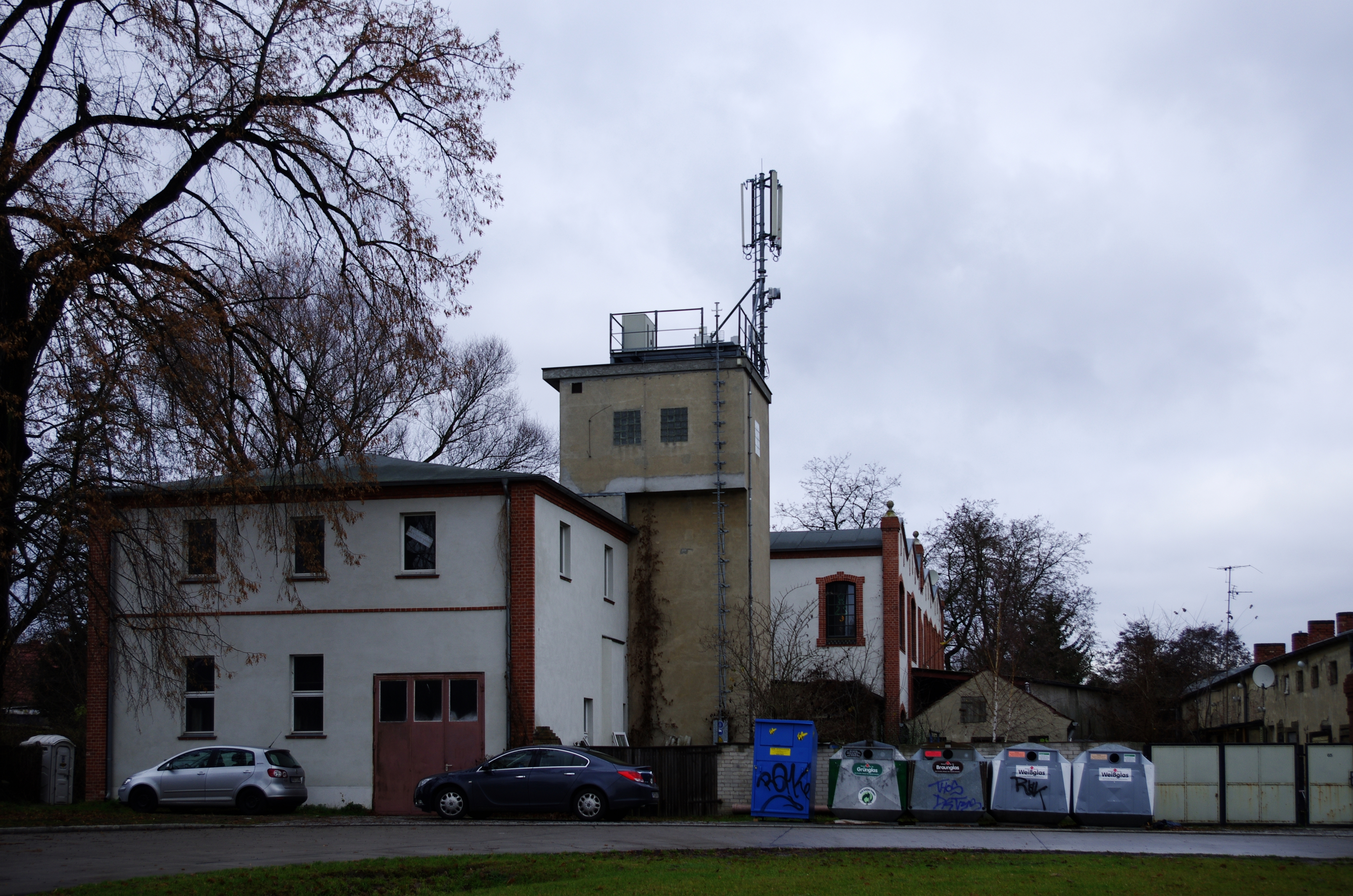 Brandenburg an der Havel, Ortsteil Göttin. Das Fabrikgebäude steht unter Denkmalschutz.